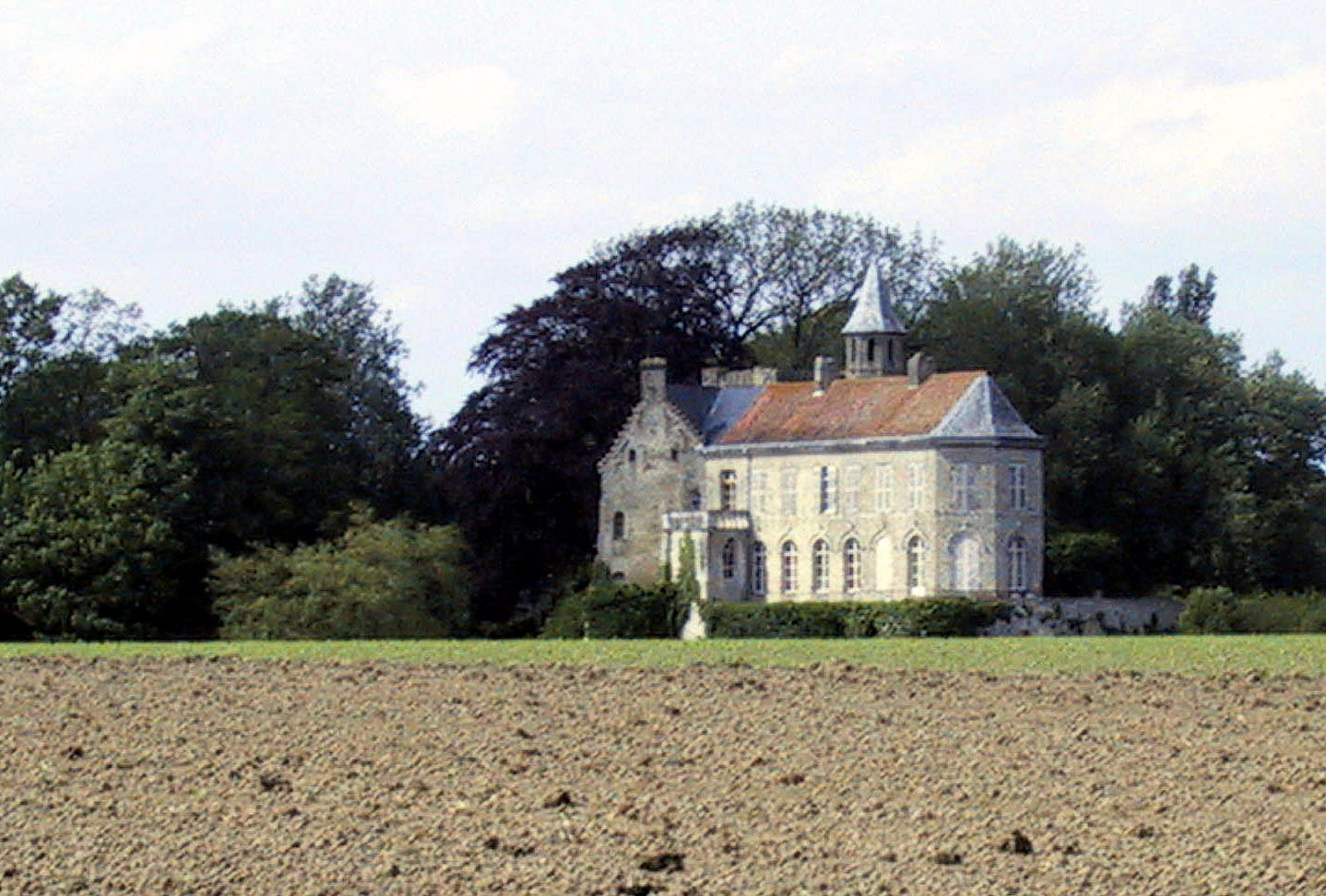 Le château de Tilques